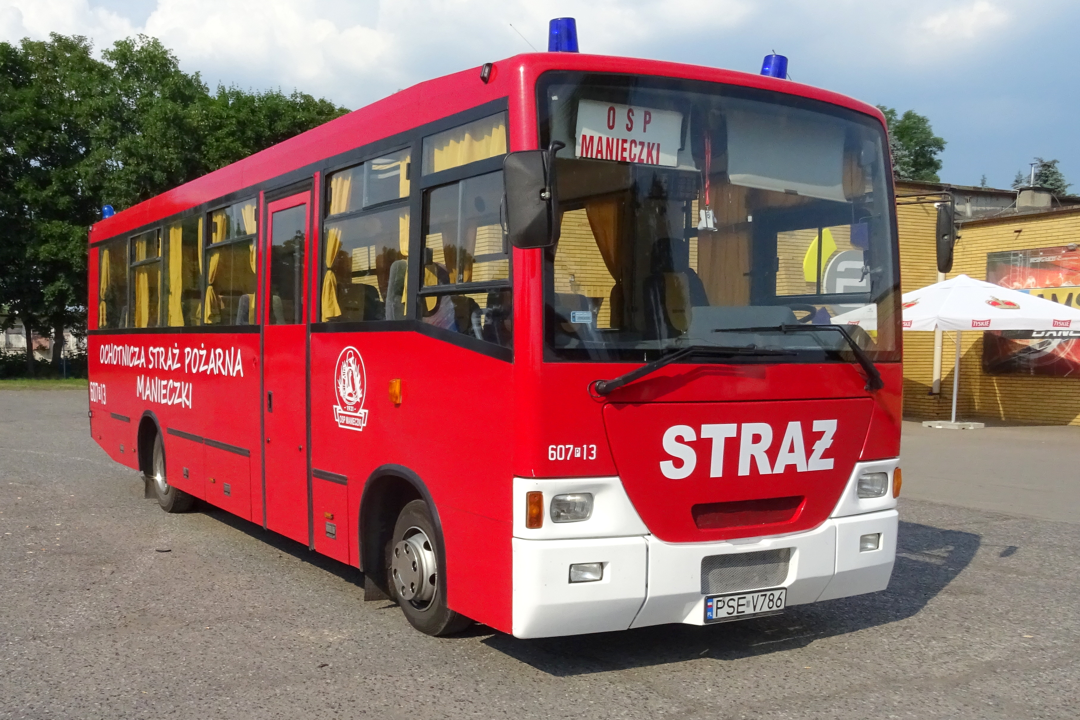 Zmodernizowany Jelcz L090M Ochotniczej Straży Pożarnej w Manieczkach (woj. wielkopolskie)